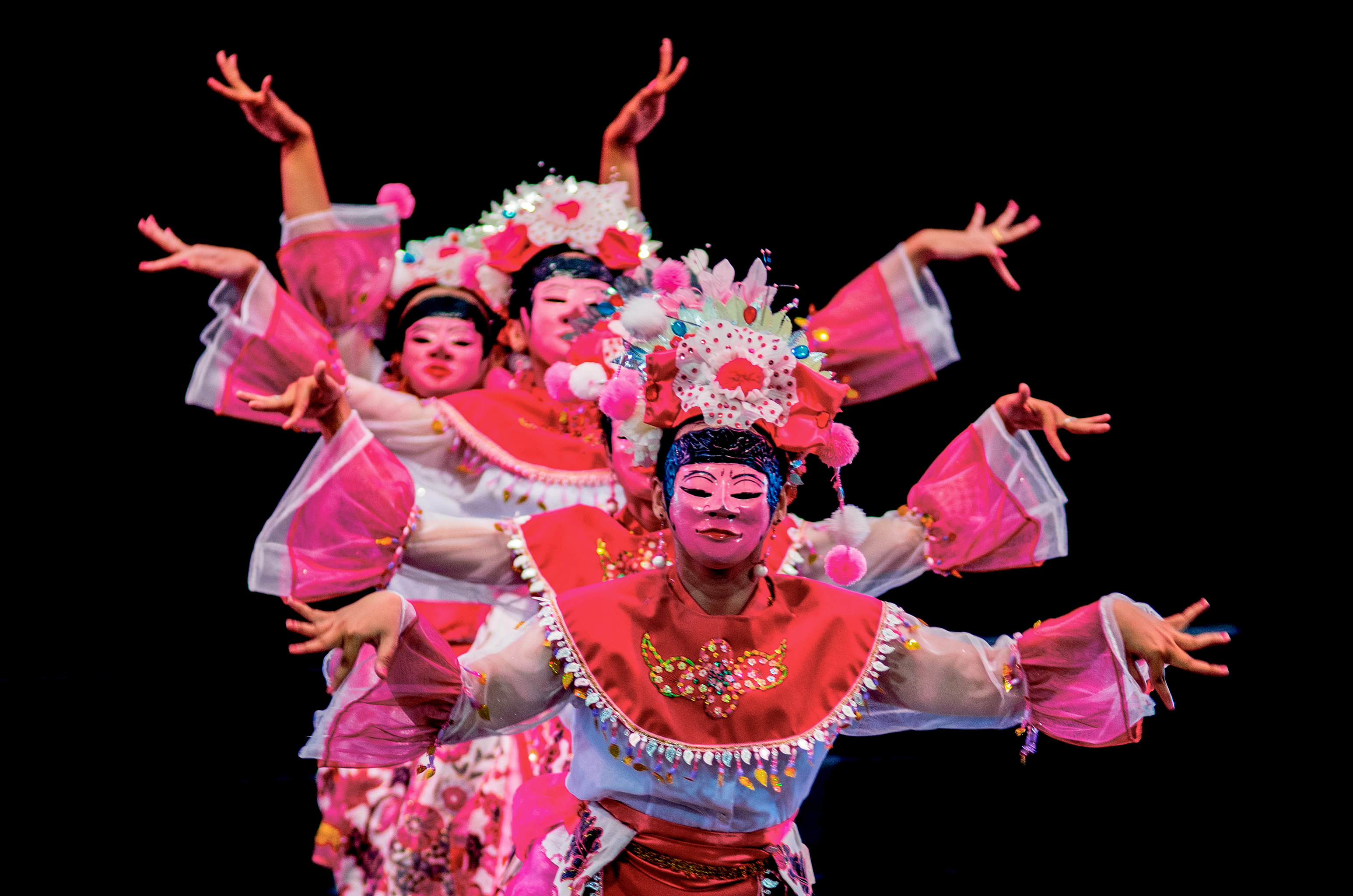 Tari Topeng Betawi, gerakannya lincah dan riang. Biasanya, tarian ini diiringi musik rebab, kromong tiga, gendang besar, kulanter, kempul, kecrek dan gong buyung.